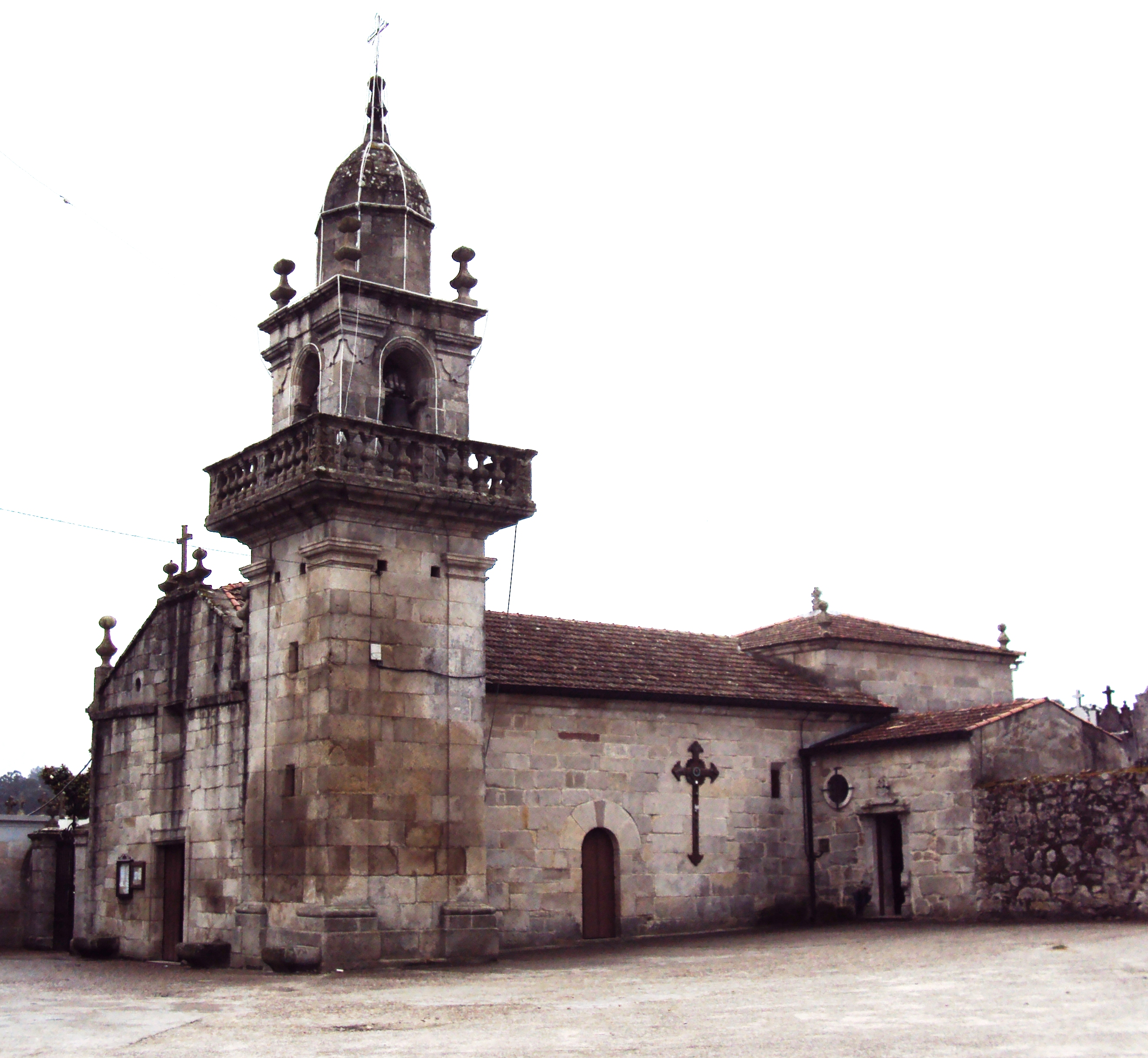 Iglesia parroquial de San Pedro de Sárdoma en Vigo, Galicia.